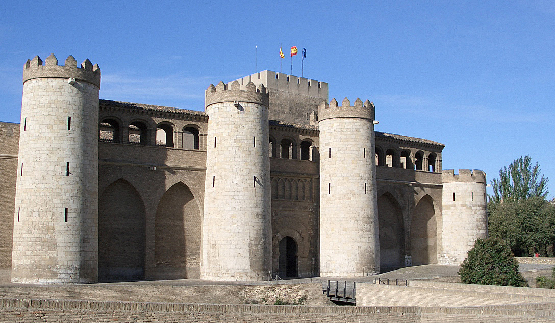 Fachada de la Aljafería 2